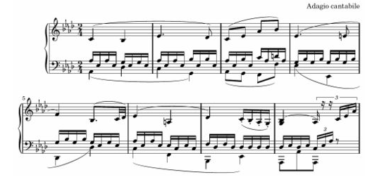 Second movement from Beethovens sonata nr. 8, op 13, bar 1 - 8